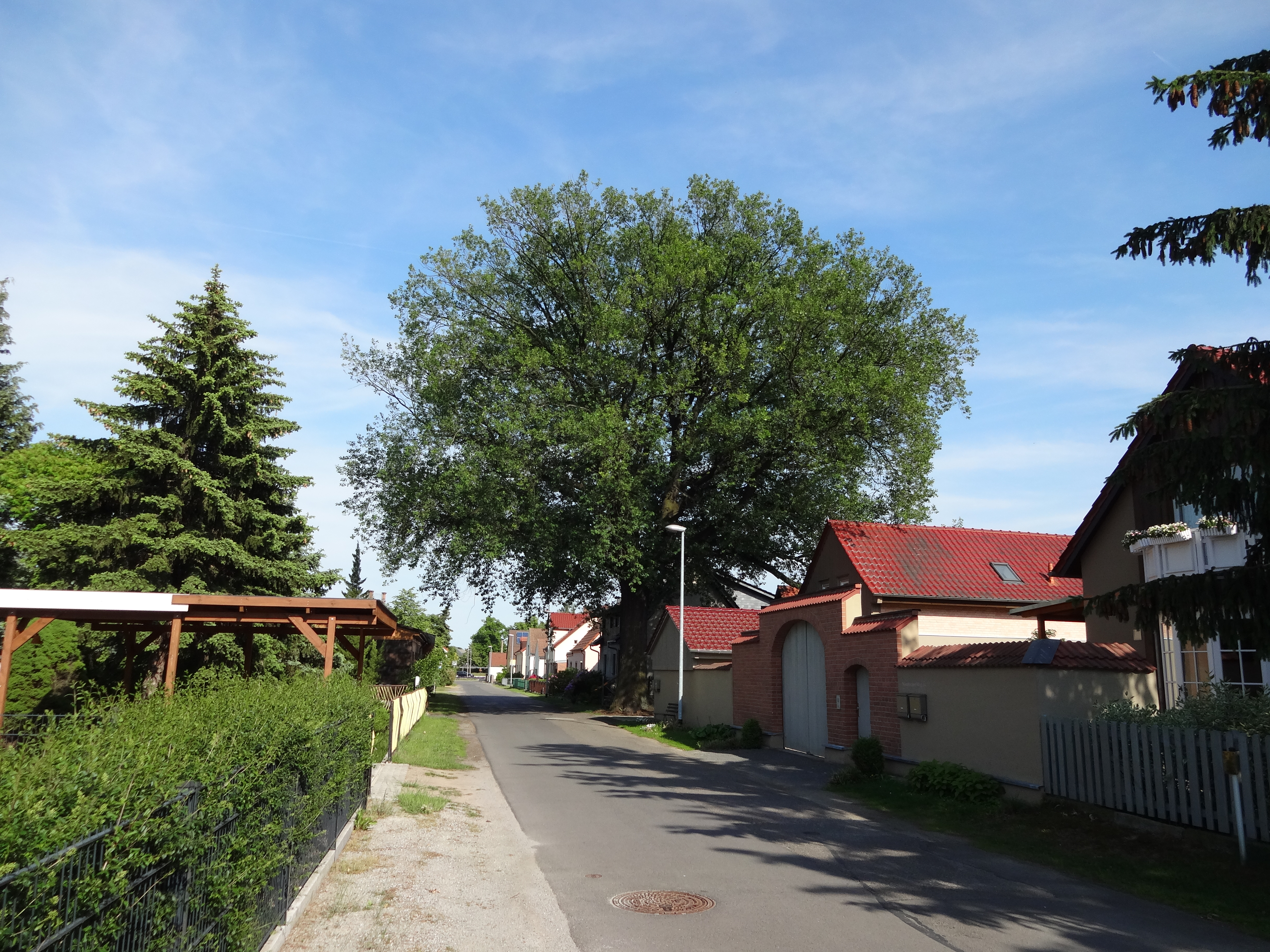 Naturdenkmale 0103-2 Stieleiche (Quercus robur) in Großkoschen neben Grundstück Niemtscher Weg 12 a